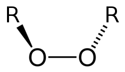 formula general de un peroxido